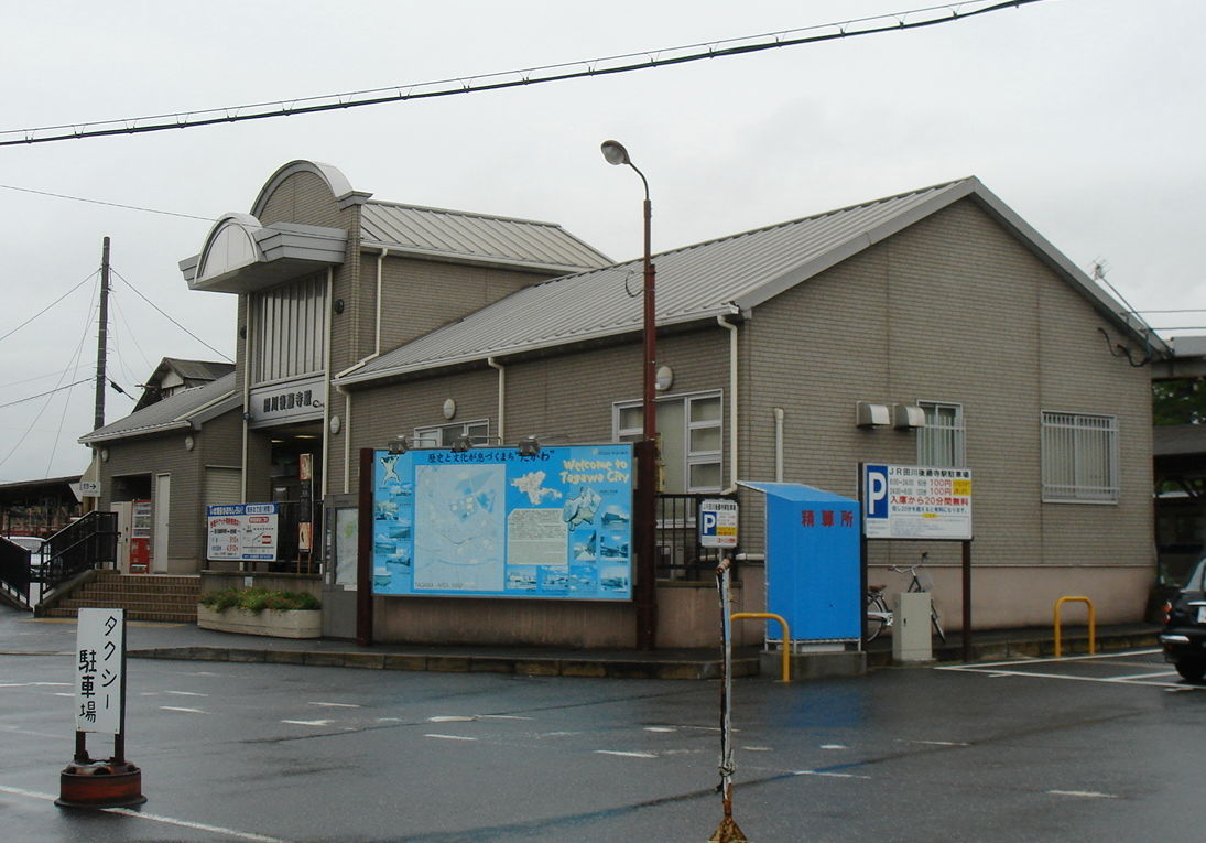 JR九州 田川後藤寺駅 駅舎 2006年8月30日に投稿者↑ＰＯＮが撮影 2006年9月13日に一部編集の上で差し替えアップロード